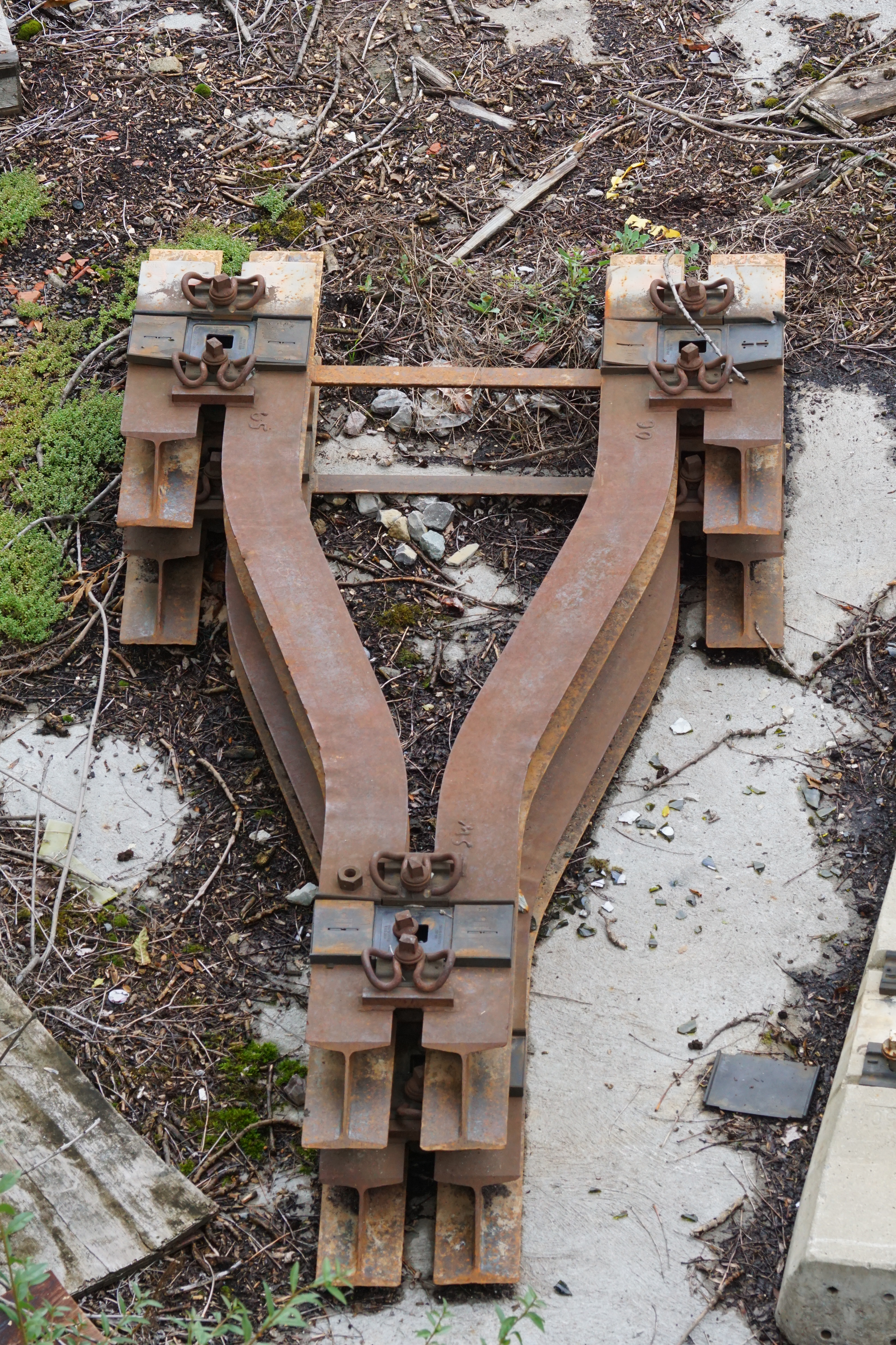 Betriebswerkstatt Korntal der Strohgäubahn.